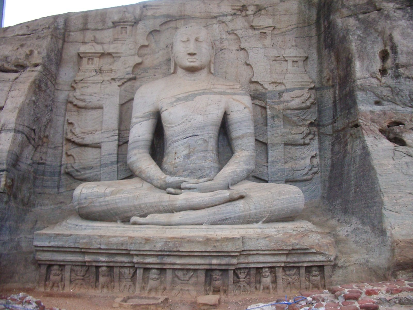 Buda al Gal Vihara, a Polonnaruwa, foto feta per J. Ollé el juliol del 2006